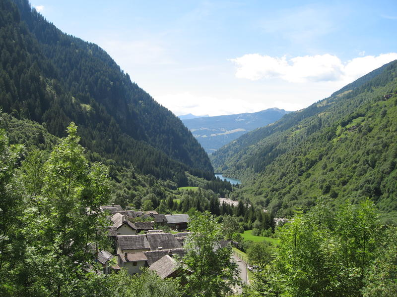 Madra e la valle viste dal "müron"